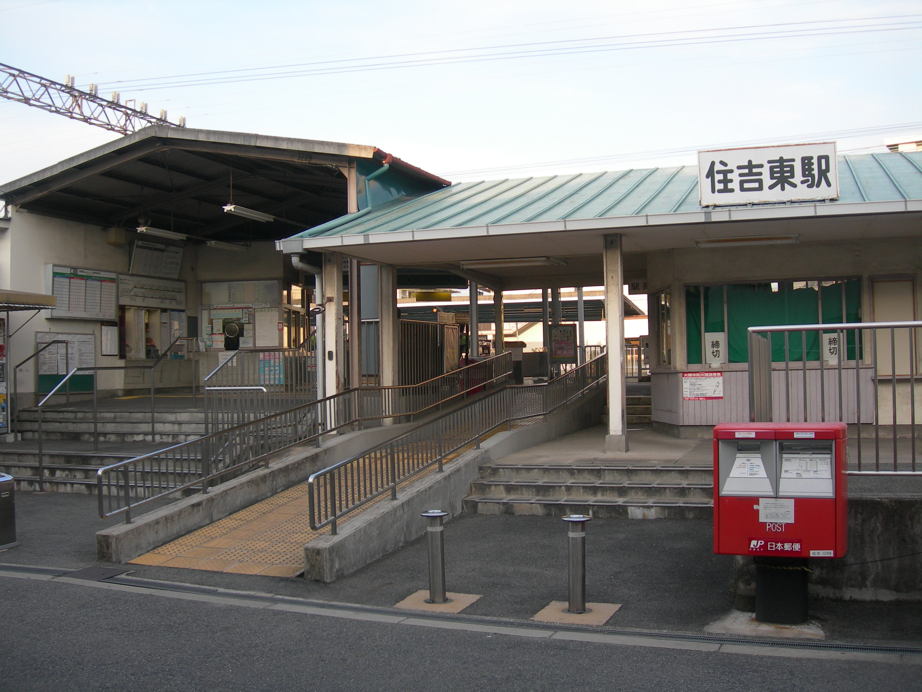 住吉東駅 なんば方面駅舎